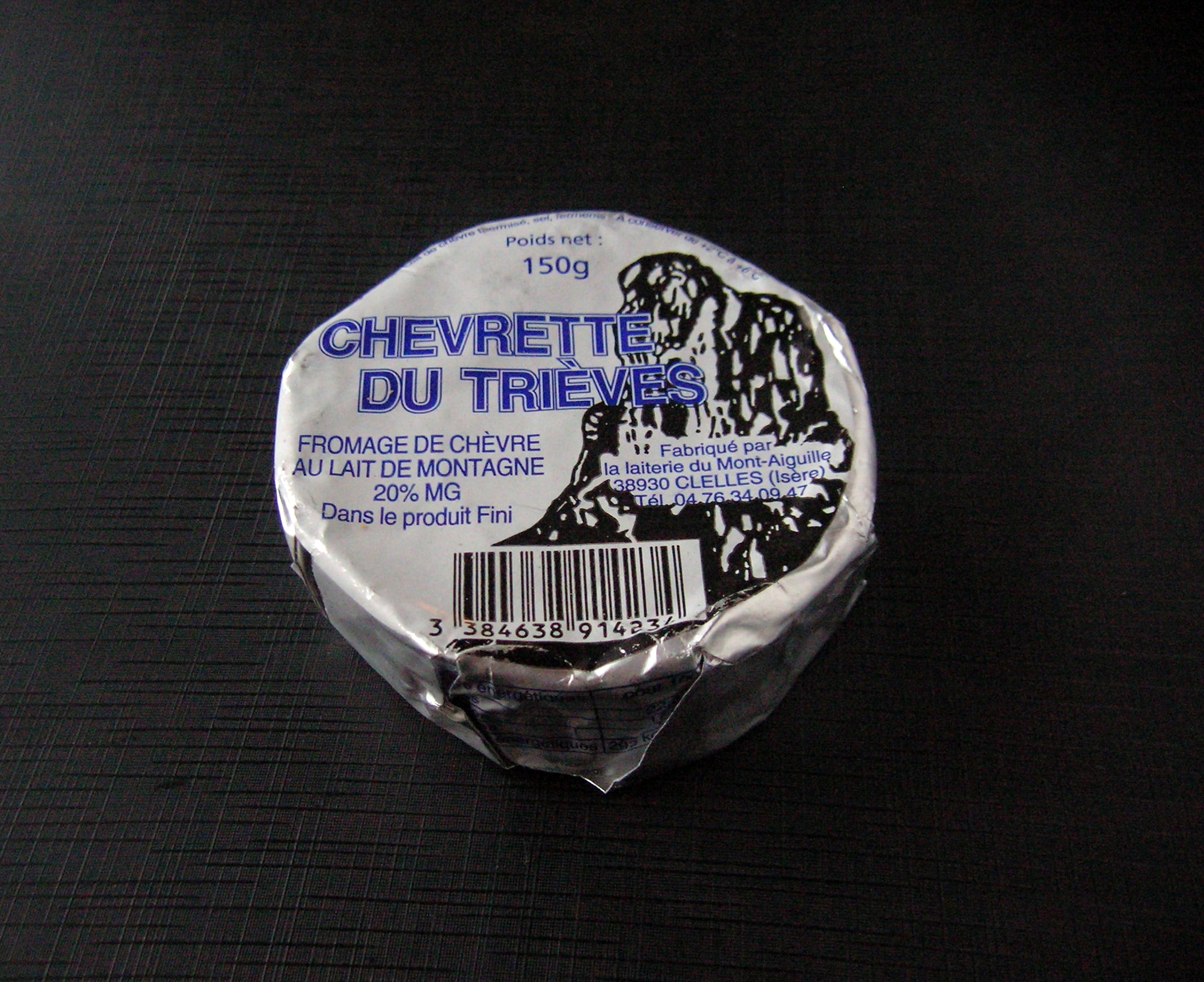 Chevrette du Trièves. Fromage du Trièves (Isère), région de la France.